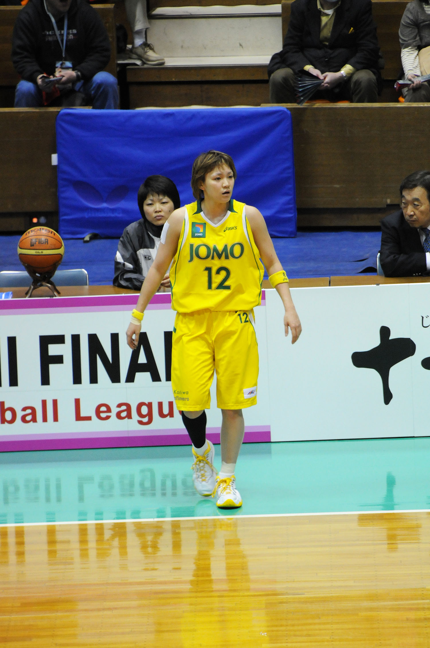 JOMOサンフラワーズの吉田亜沙美選手。代々木第二体育館で。